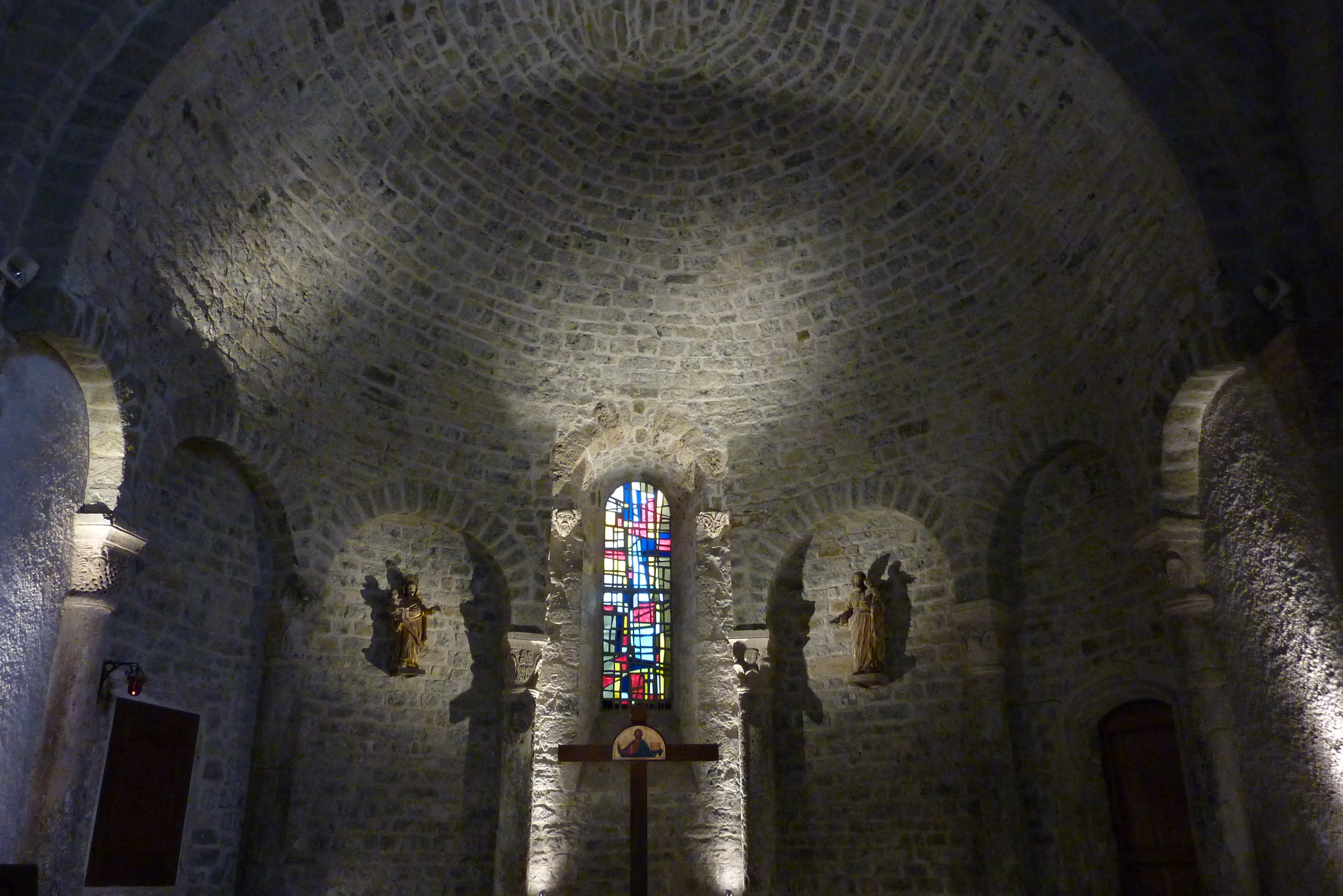 romanische Kirche Notre-Dame in Piégros-la-Clastre